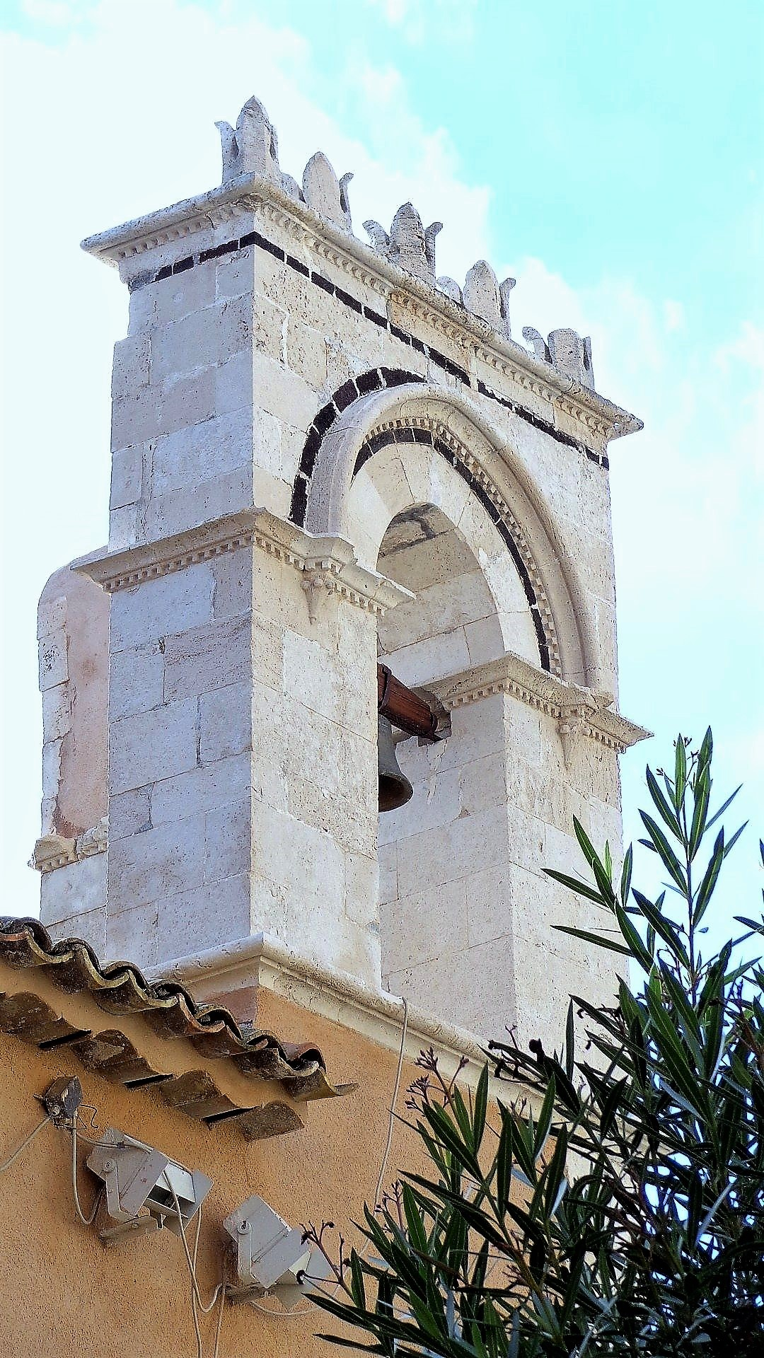 Campanile di San'Agostino, Taormina. La foto è contemporanea a tutti gli scatti già inseriti alla voce Duomo di Taormina. E' presente sul profilo personale FB, pertanto, potenzialmente tutti potrebbero avanzarne la paternità.